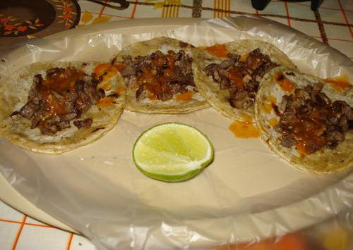 tacos